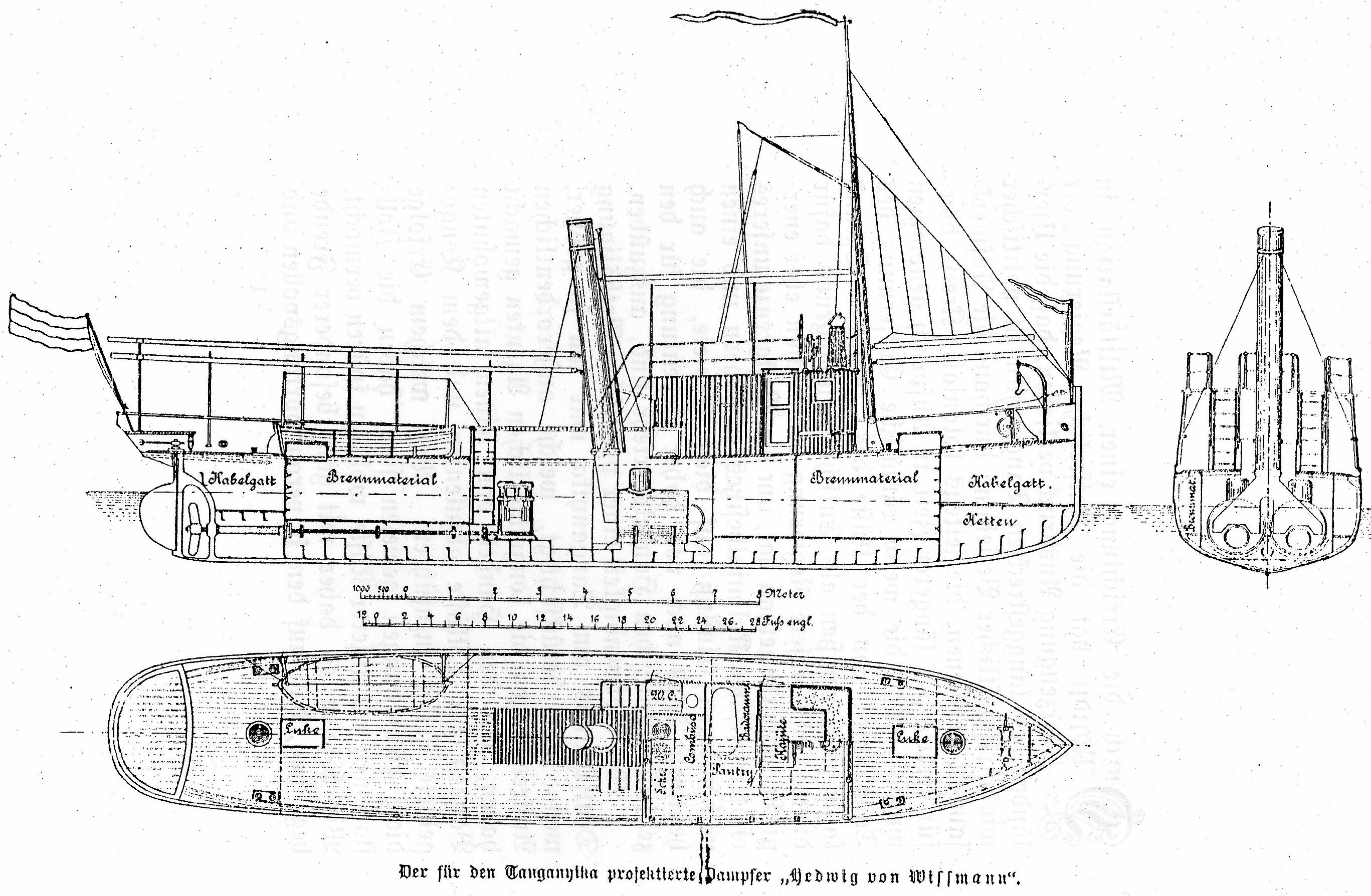 Plan für die Hedwig von Wissmann